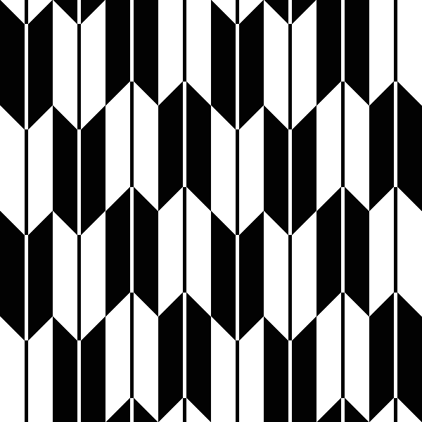 箭羽紋圖案